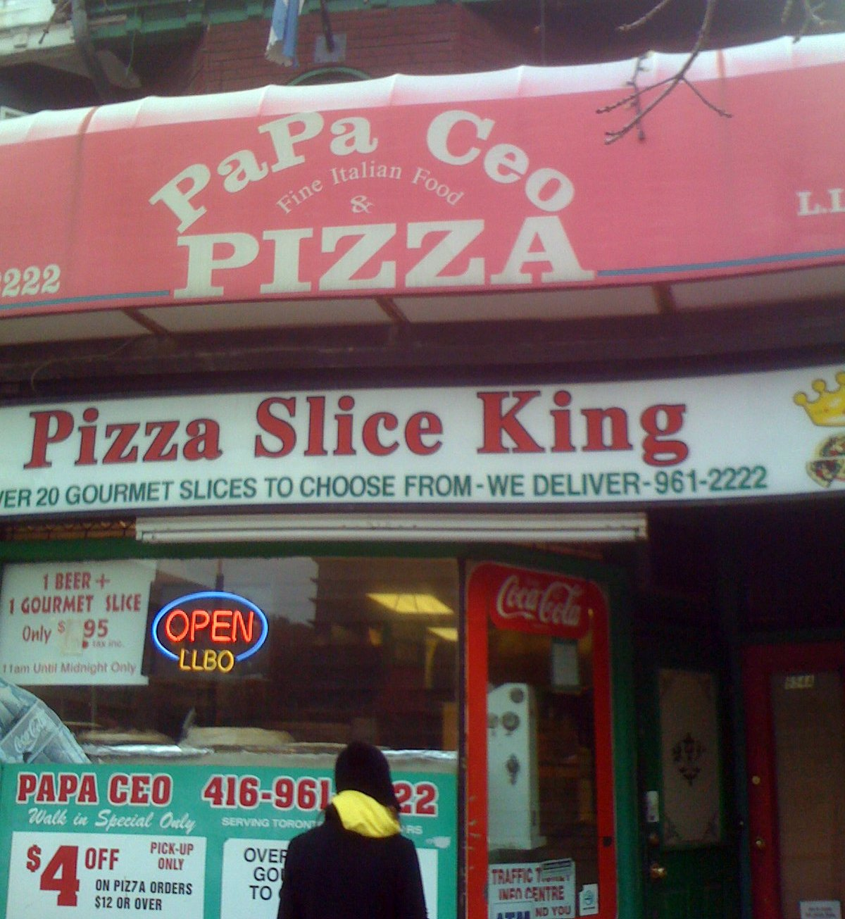 Papa Ceo Pizza, 654 Spadina Avenue, Toronto, Canada (The Pizza Review)